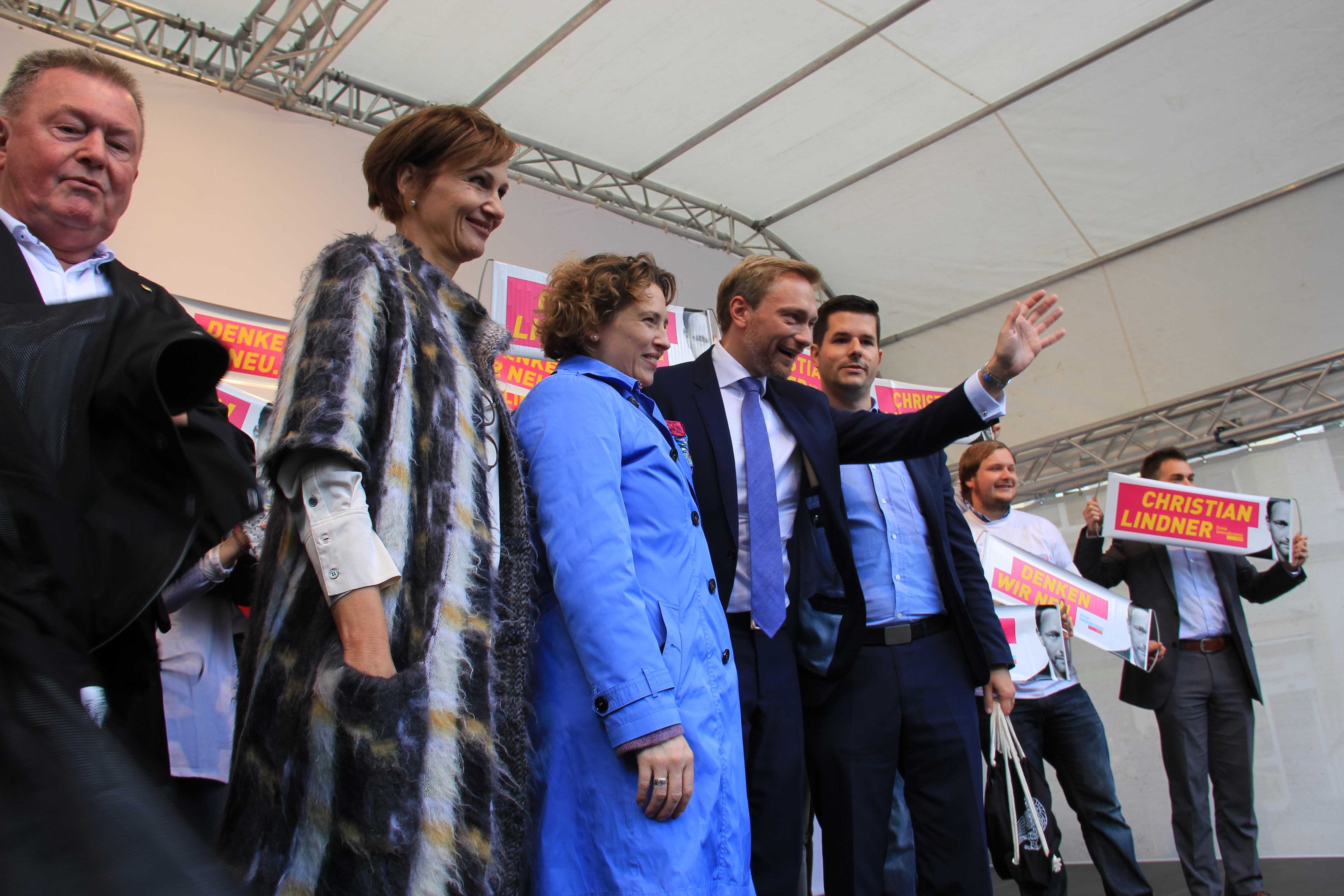 Wahlkampfveranstaltung der FDP auf dem Opernplatz in Kassel am 12.09.2017 unter anderem mit, Chritian Lindner, Nicola Beer, Matthias Nölke